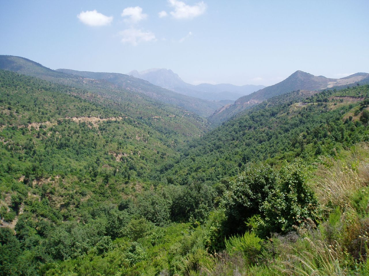 Paysage de Kabylie (Béjaïa, Algérie).